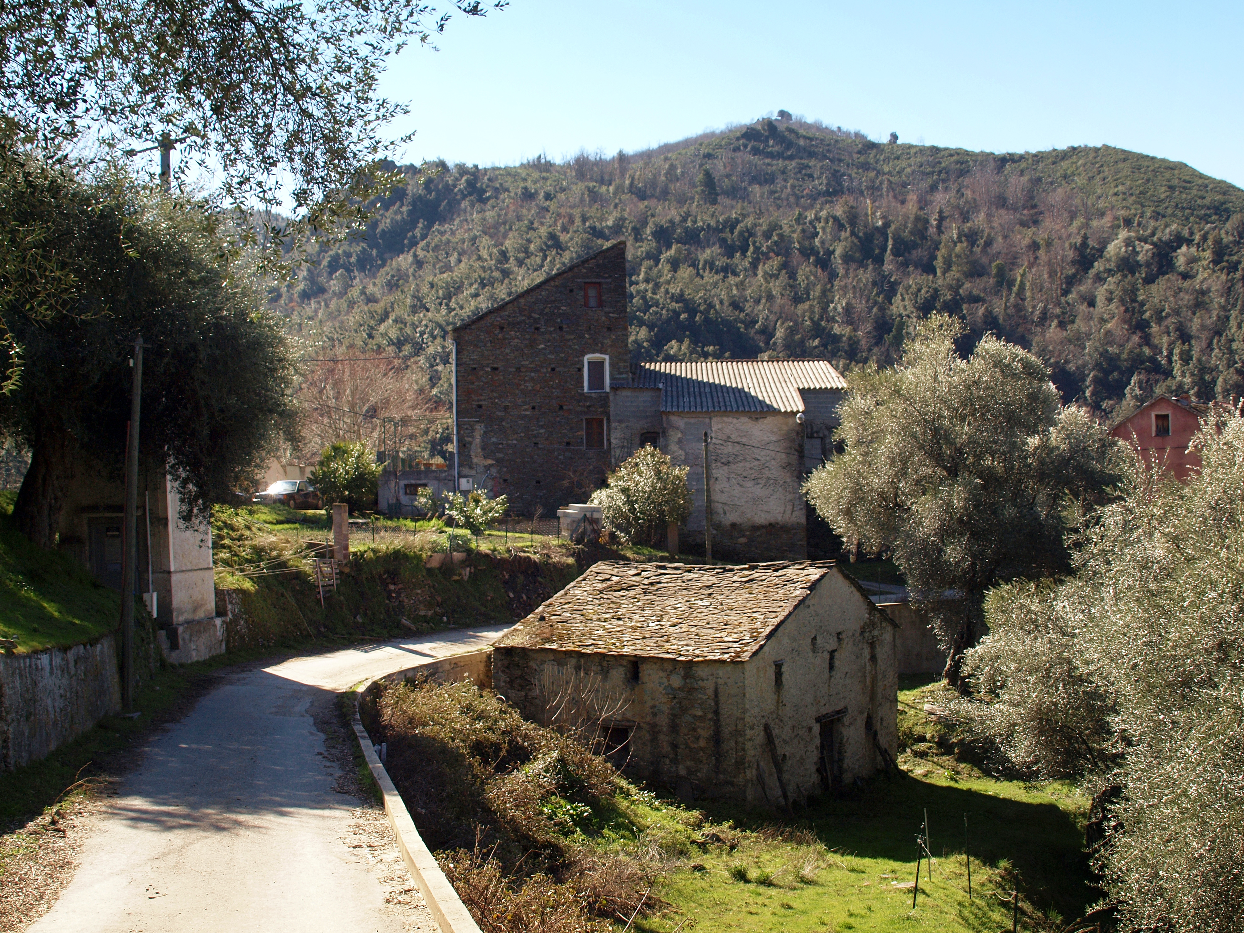 Bisinchi, Rustinu (Corse) - Hameau de Fornu entouré d'oliviers